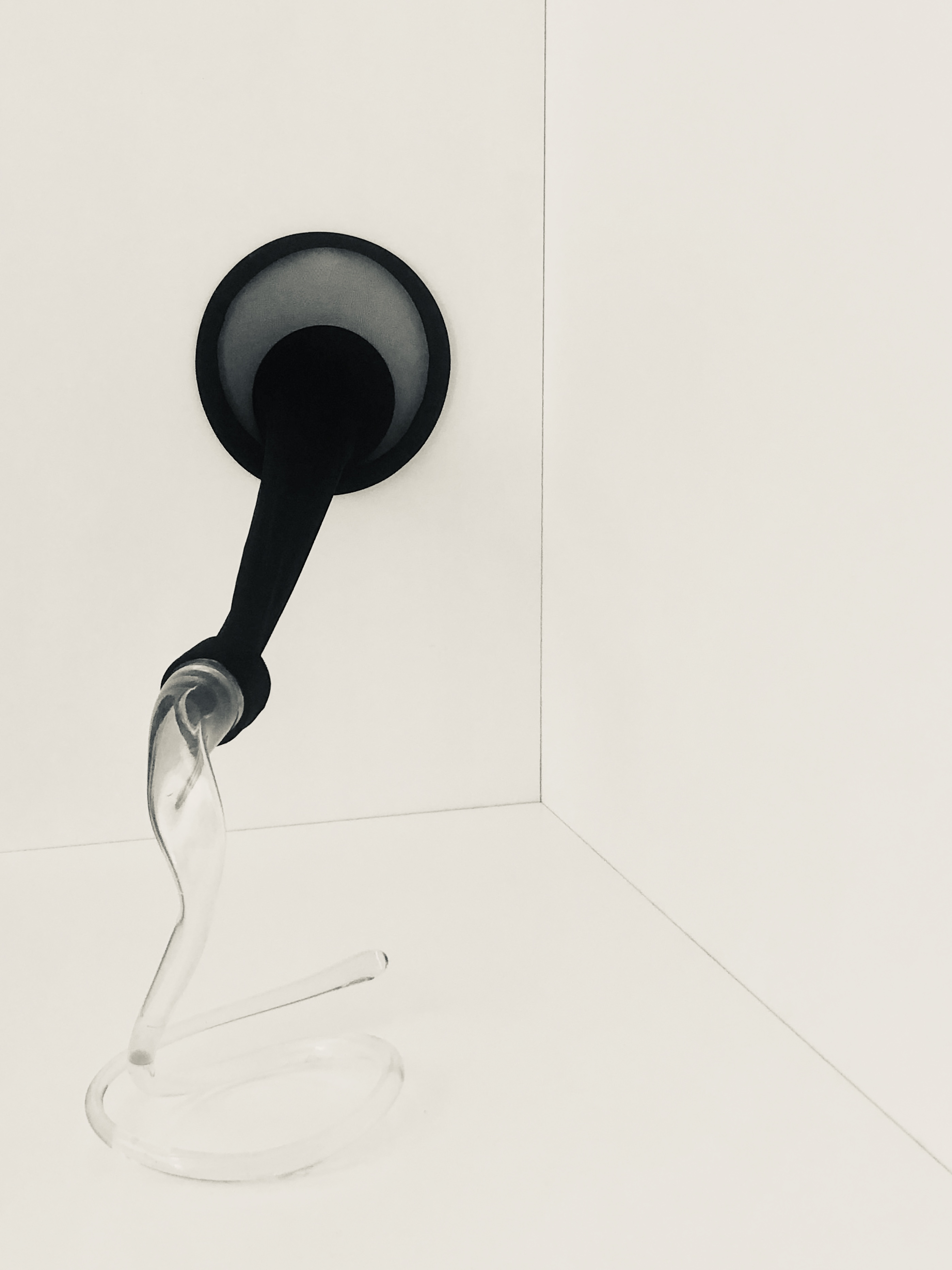 Imagem captada na exposição "Artes Plásticas . Estética e Experimentação" organizada pelo Pelouro da Cultura da Câmara Municipal Santa Maria da Feira.